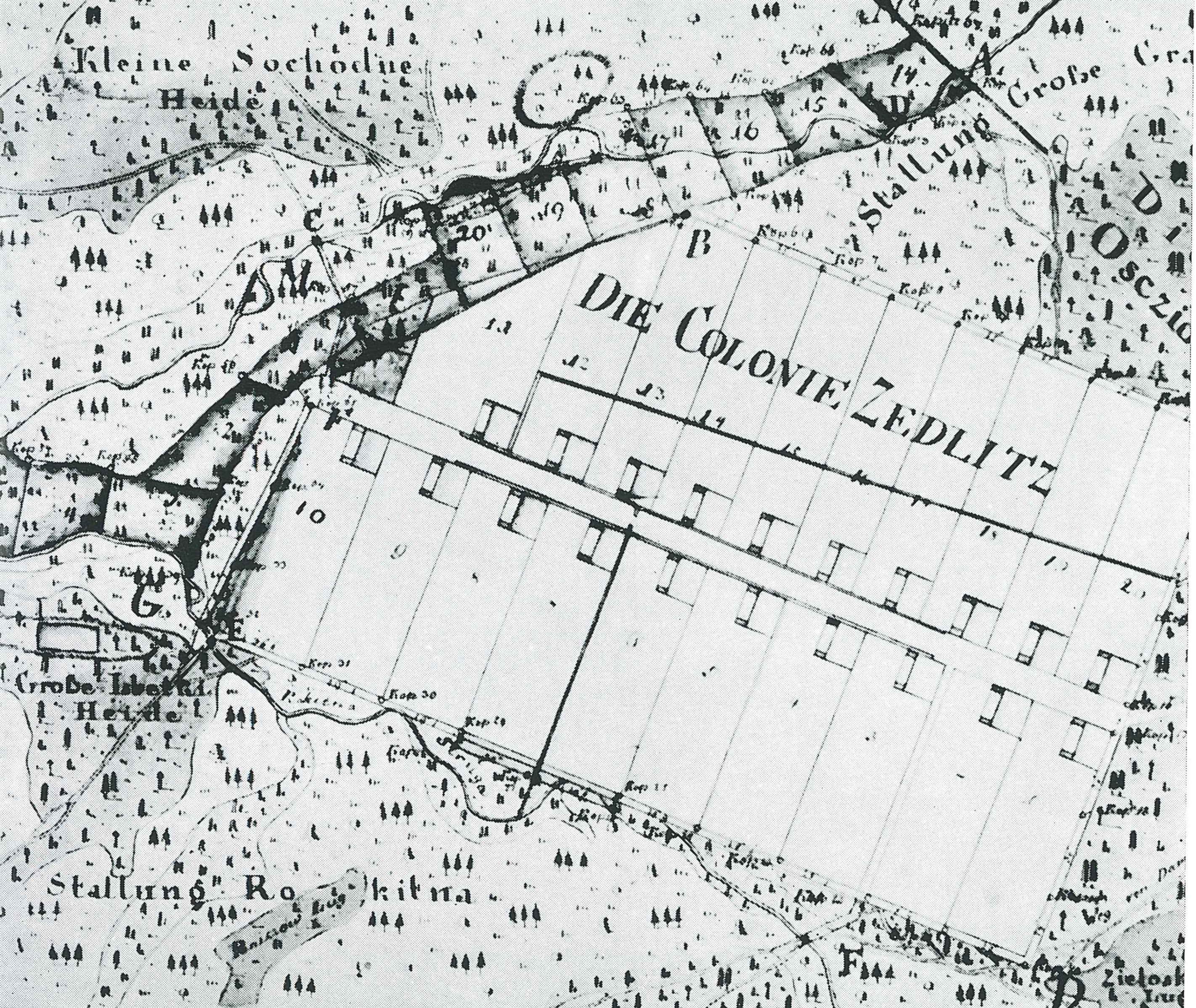 Zedlitz Landkreis Oppeln (Grabice) - Planzeichnung von 1773